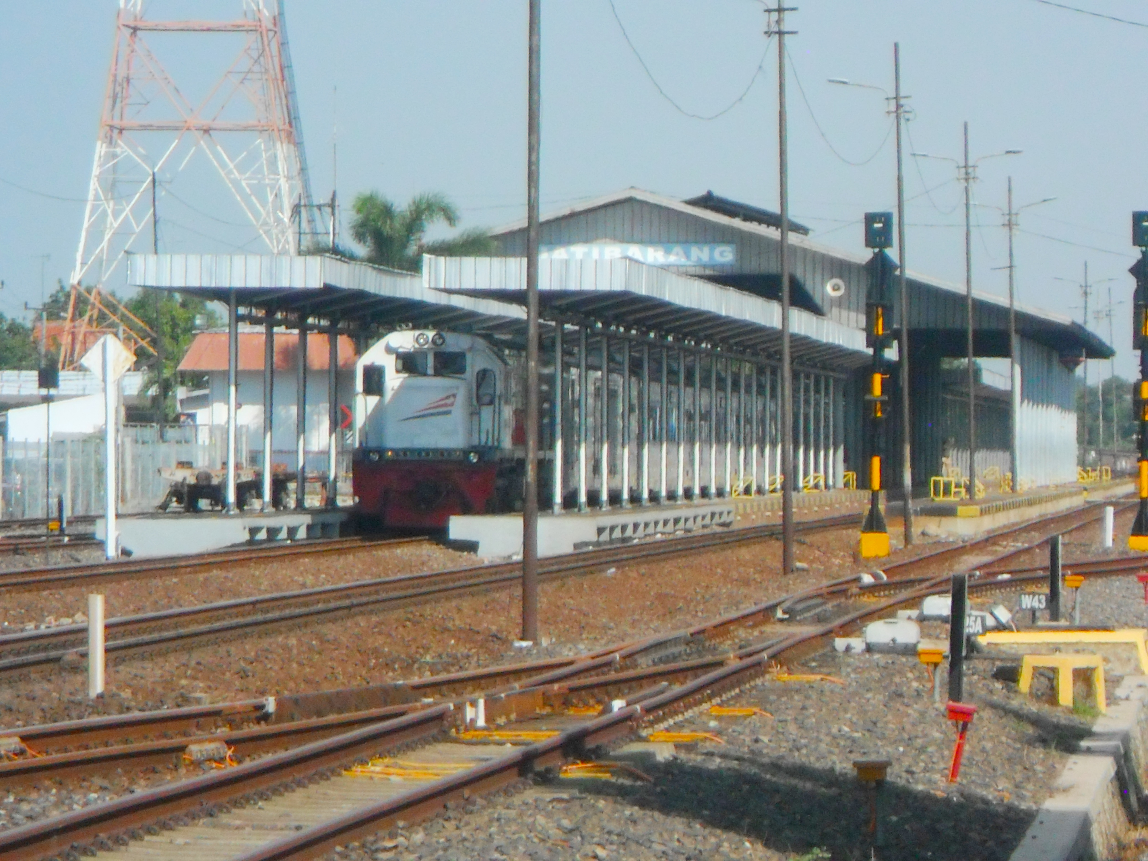 Jawa: ꦱꦼꦠꦱꦶꦪꦸꦤ꧀ ꦗꦠꦶꦧꦫꦁ